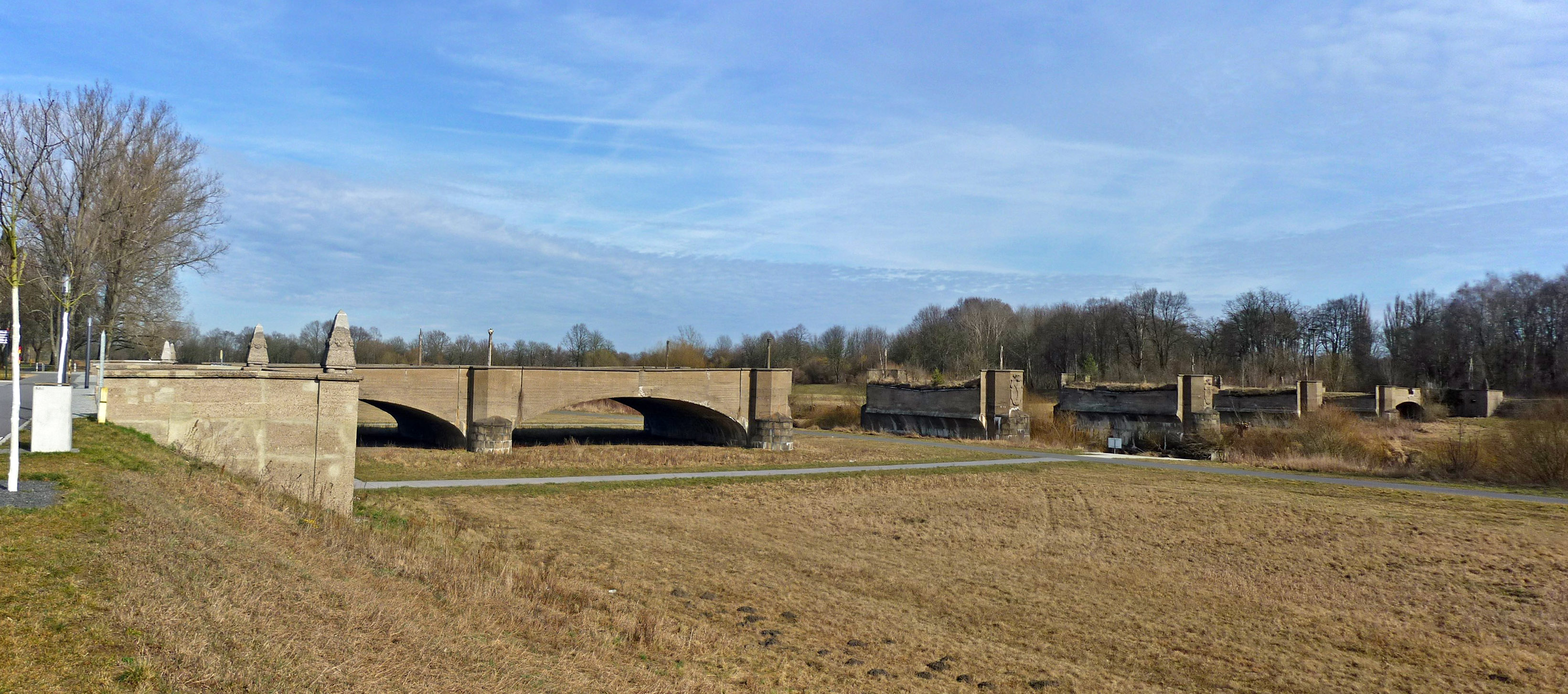 Zerstörte Brücke in Forst (Lausitz)